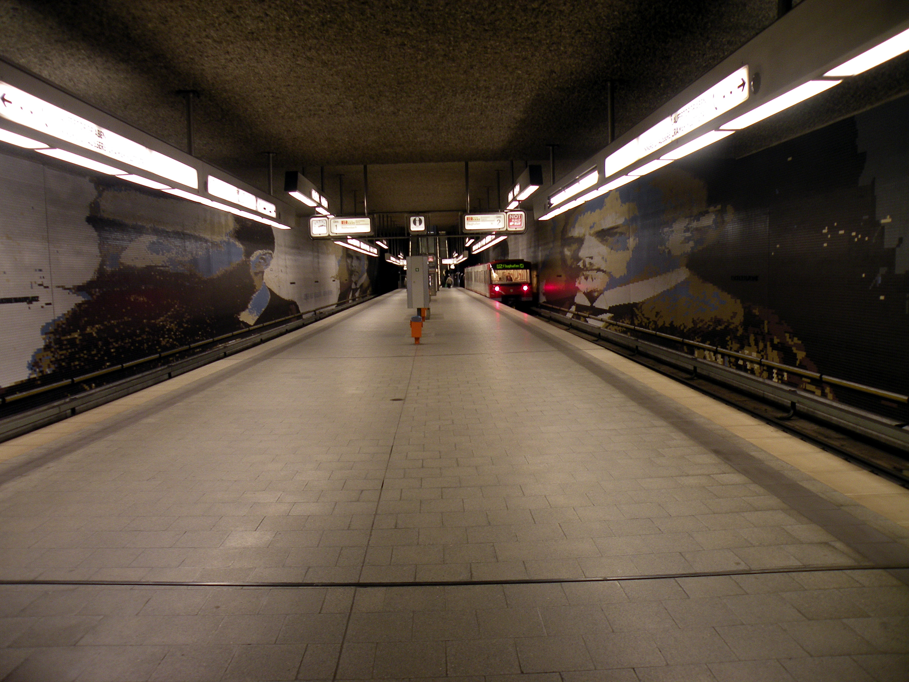 Nurnberg.Rathenau Platz subway station. Künstlerische Gestaltung des Großmosaiks 1990 von Gregor Hiltner (zeigt links Theodor Herzl, rechts Walther Rathenau)